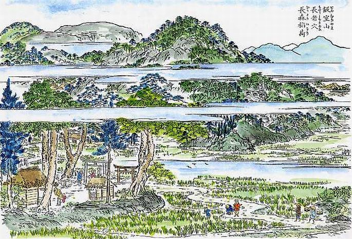 彩色江戸名所図会